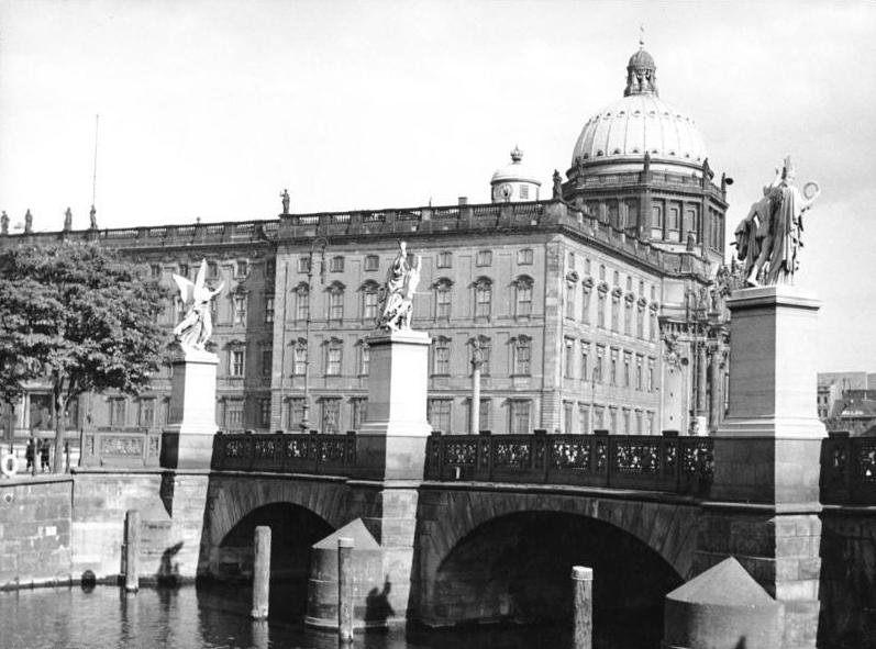 Ost-Berlin-Schloß-Vorkriegsaufnahme Das Königliche Schloß am Ostausgang "Unter den Linden" (heute Sowjetsektor) existiert nicht mehr. Es wurde auf Befehl des Sowjetstatthalters Ulbricht abgerissen, der Schloßplatz samt dem Lustgarten einplaniert, mit rotem Kies bestreut, zu einer Aufmarschstätte mit Tribüne verwendet und mit dem Namen "Marx-Engels-Platz" bedacht. Der älteste Teile des Schlosses stammt aus dem 15.Jahrhundert. Danach erweiterten es alte bekannte Baumeister der preußischen Könige im Stil ihrer Generation: Andreas Schlüter und Eosander (Barock 1698-1713), C.G. Langhans, F.W. Erdmannsdorff und C. von Gontard fügten Räume im Stil des Rokoko und "Sturm und Drang" hinzu, und Schinkel nahm Neugestaltungen im Stil des Klassizismus vor, bis schließlich A. Stüler in gleicher Bauart über das Eosander-Portal die Kuppel (1845-1853) setzte.